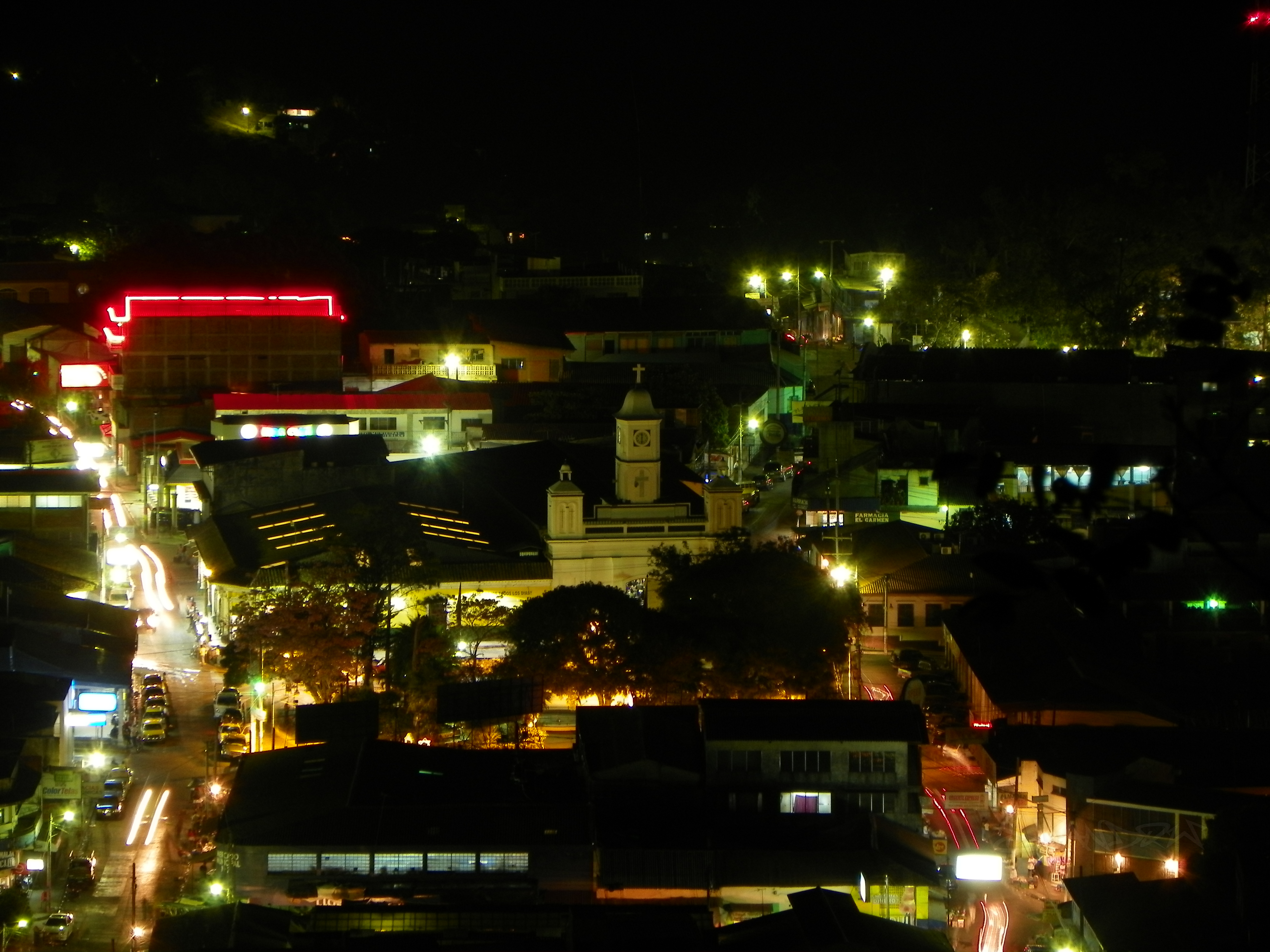 Cojutepeque de noche visto desde el cerro de las Pavas